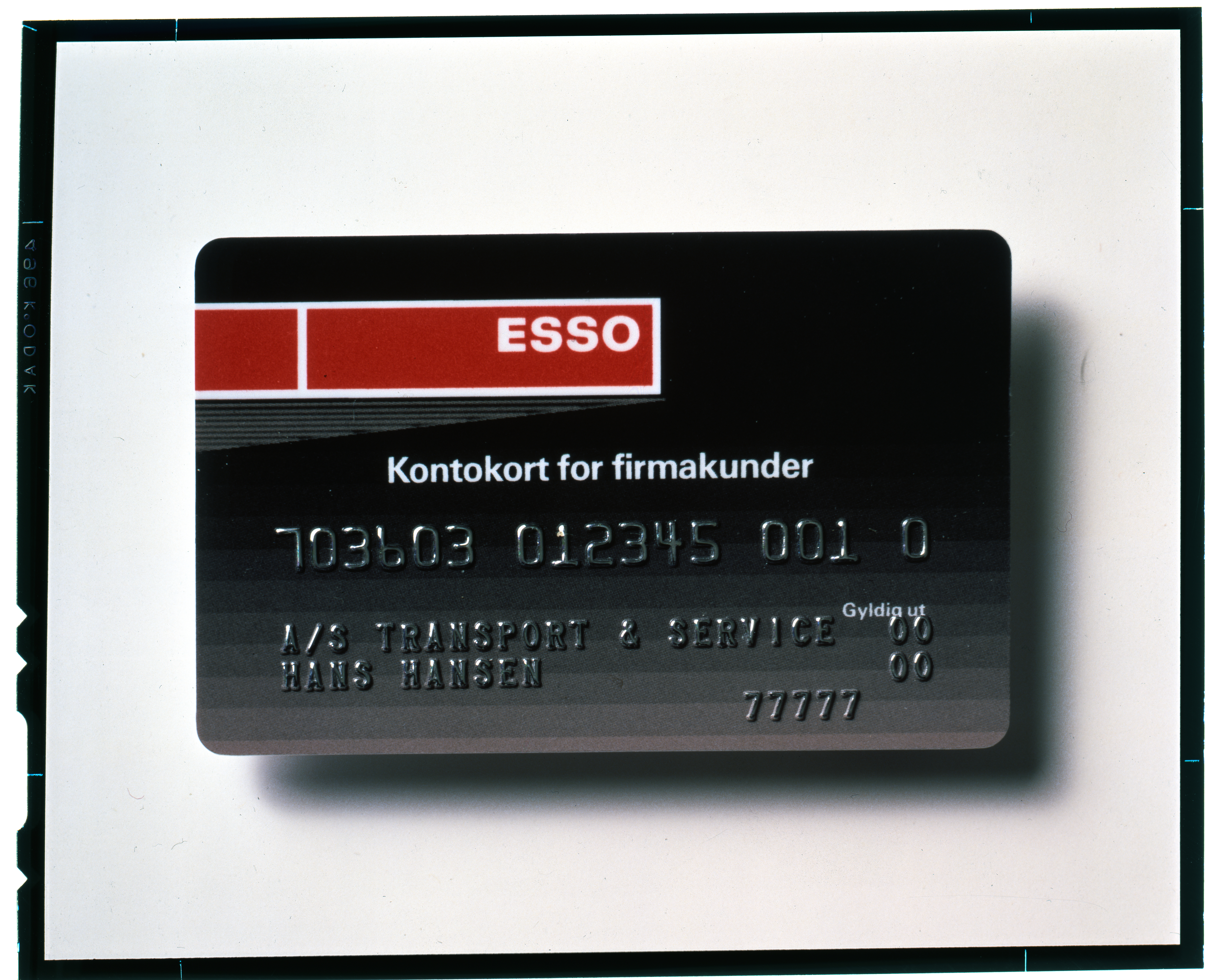 Bildet er hentet fra Arkivverket. Bankkort. Esso kontokort. Arkivinstitusjon : Statsarkivet i Stavanger Arkivnavn : Pa 0982 - Esso Norge A/S Sted : Norge, , , Emneord: Bensinstasjon, Olje, Petroleum Avbildet